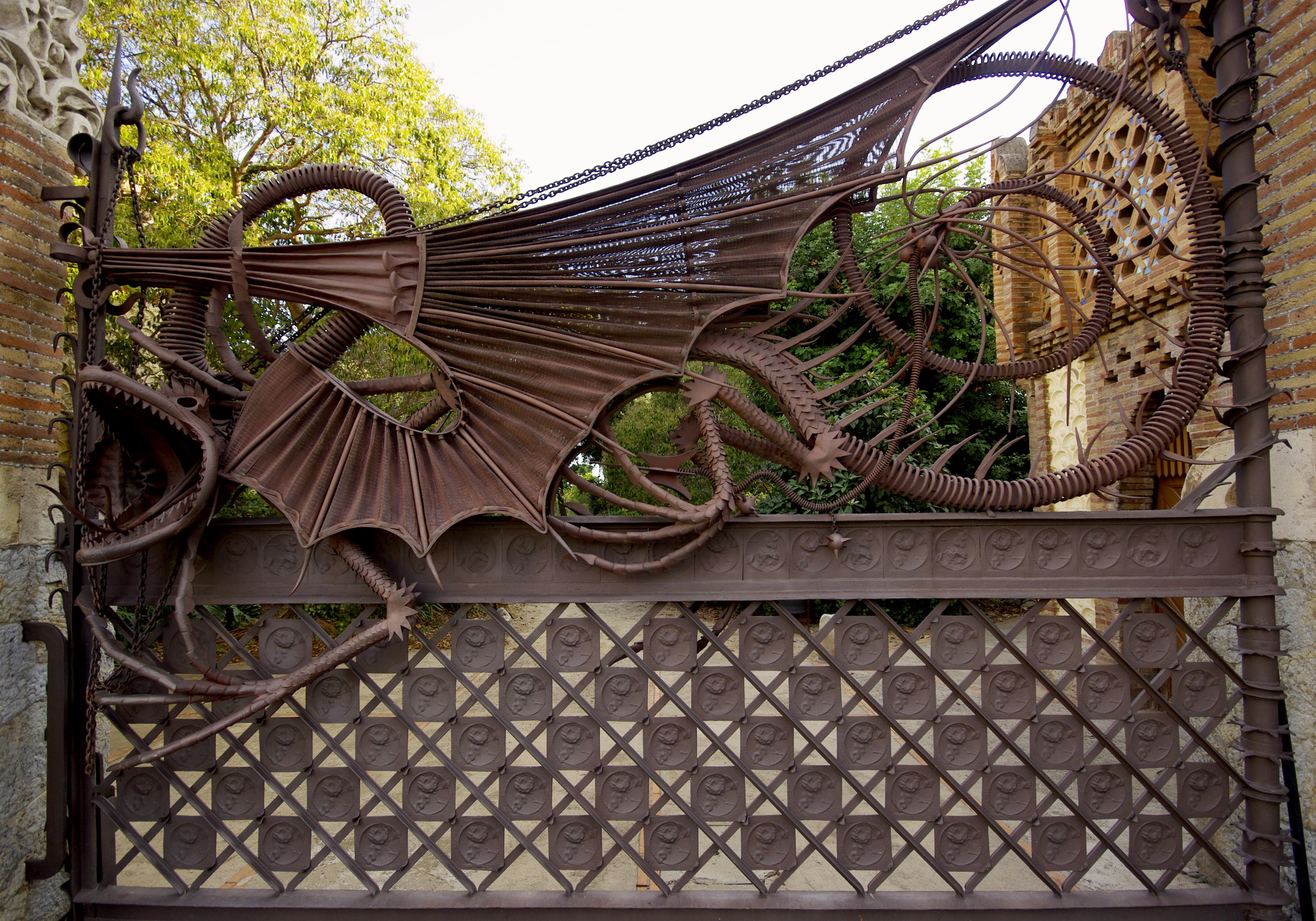 Pavellons de la Finca Güell (Barcelona)